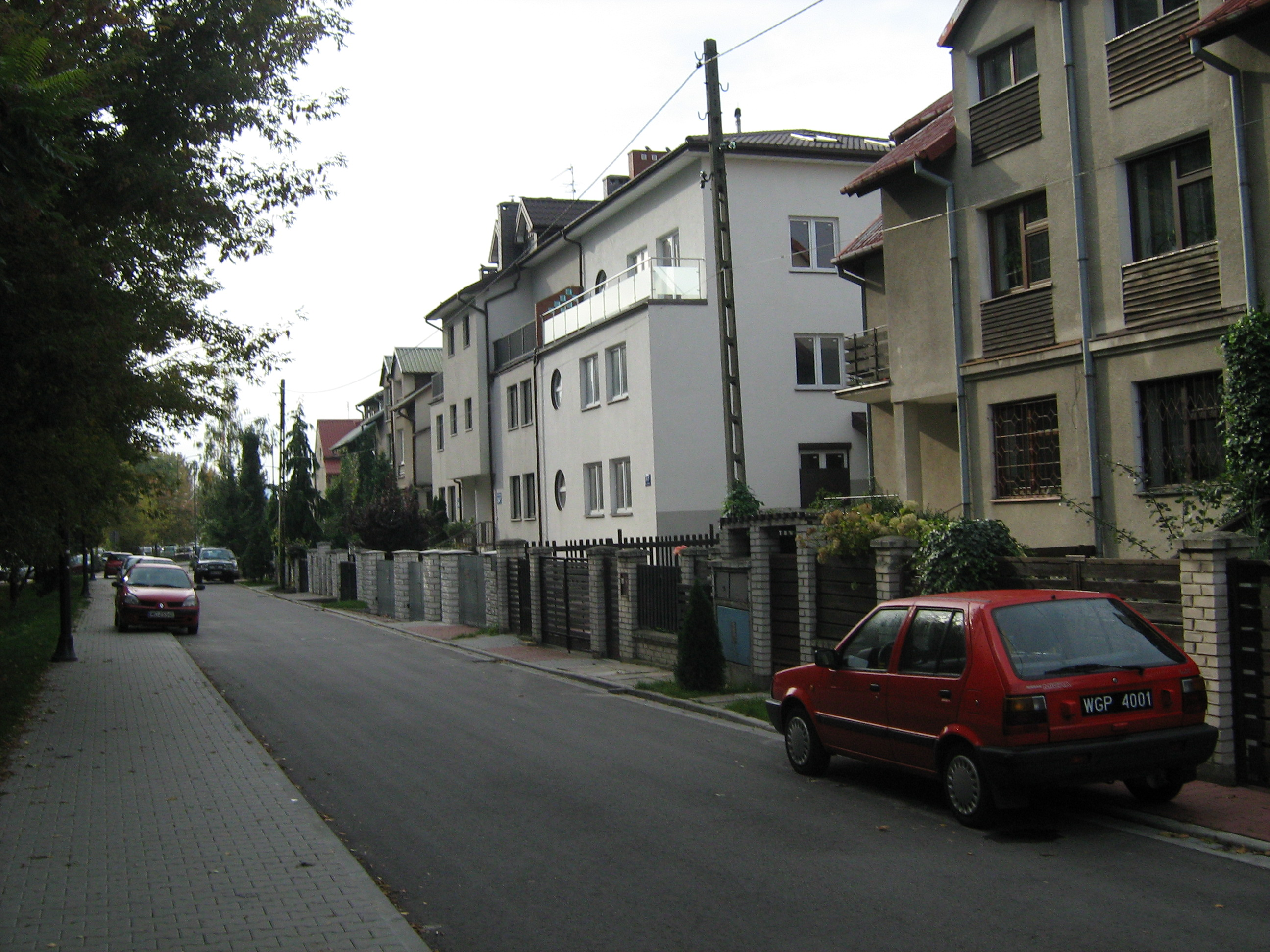 Marymont-Ruda Housing estate in Warsaw, Klaudyny street (Poland) Osiedle Marymont-Ruda w Warszawie, ul. Klaudyny